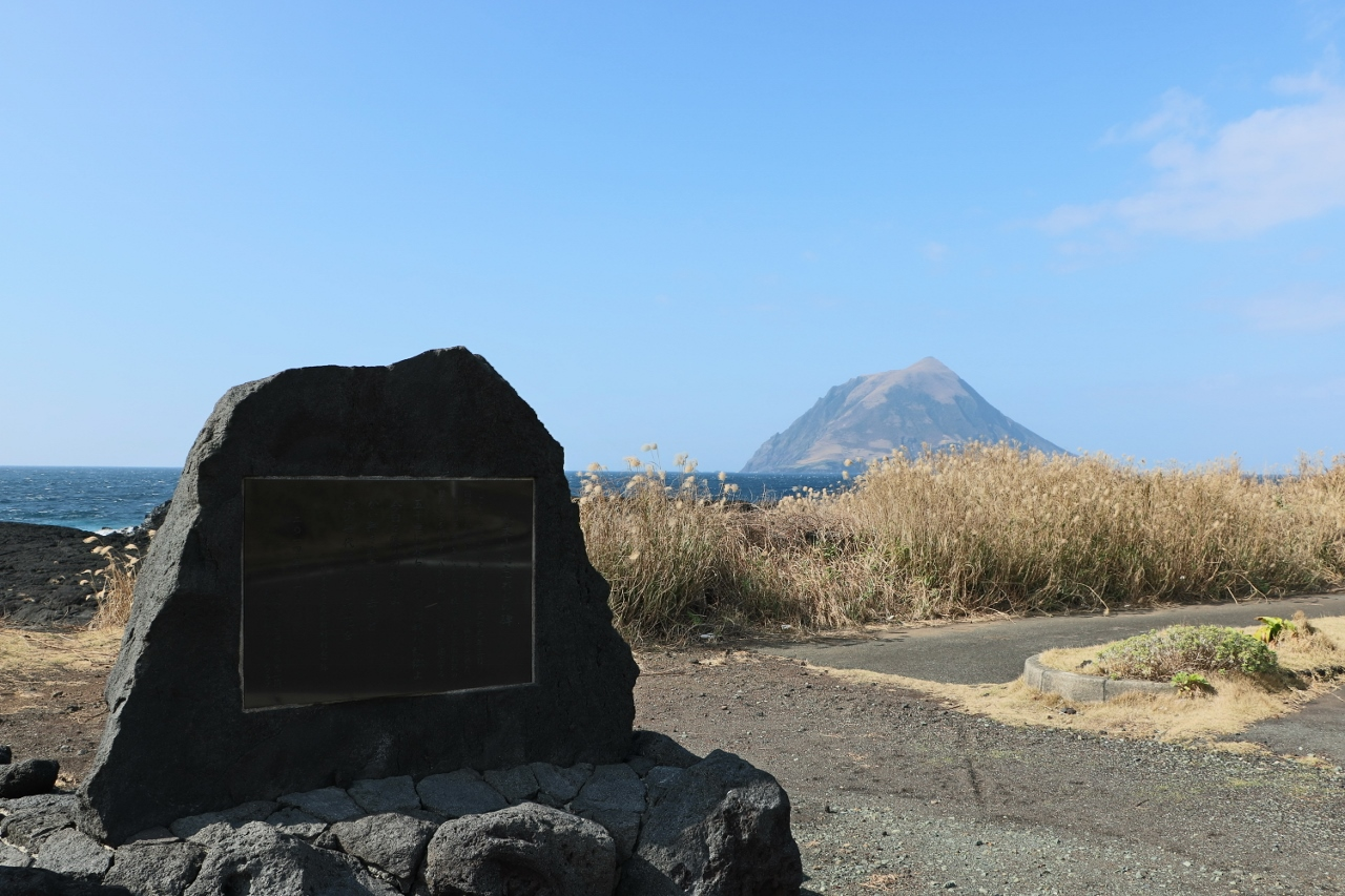 『八丈小島忘れじの碑』と八丈小島（東京都八丈町）南原千畳敷。